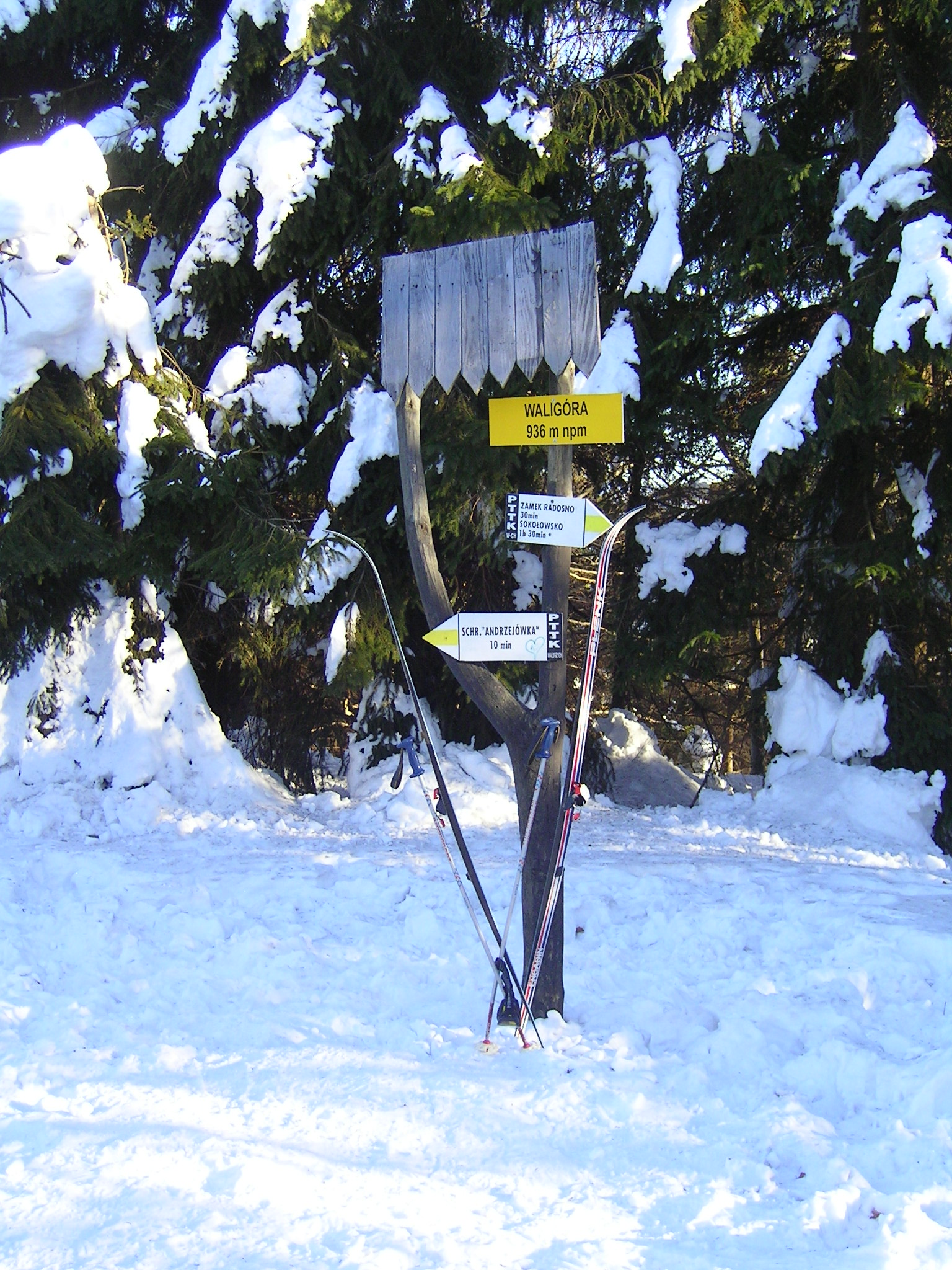 Szczyt Waligóra w Górach Suchych.